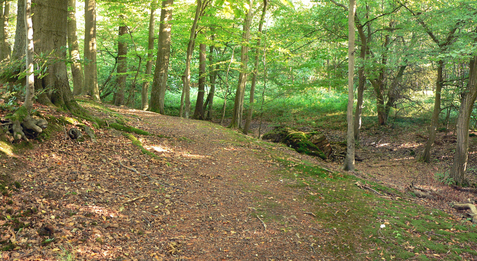 Grabenrest um Lucccaburg